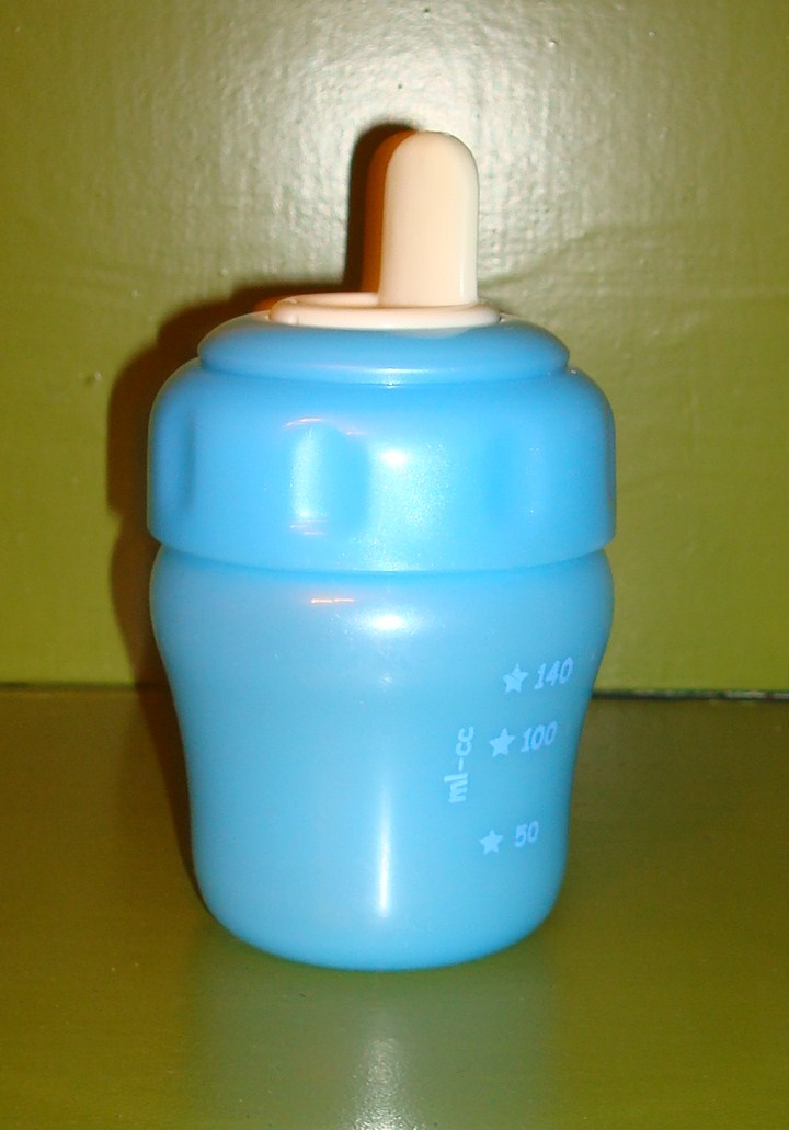 Norsk (bokmål): Tutekopp i plast. Høyde 12'5 cm.